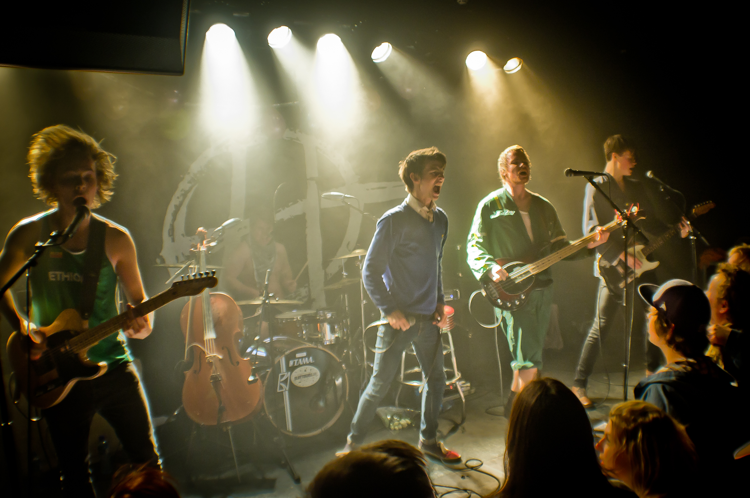 Honningbarna på Total 2011